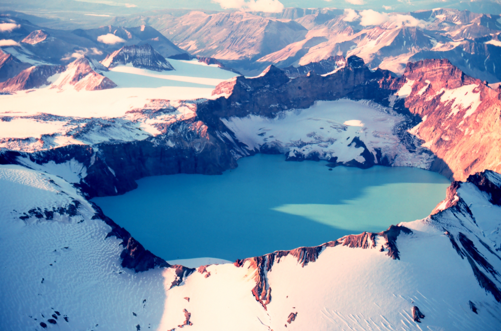 Katmai Crater - Mount Katmai, Alaska